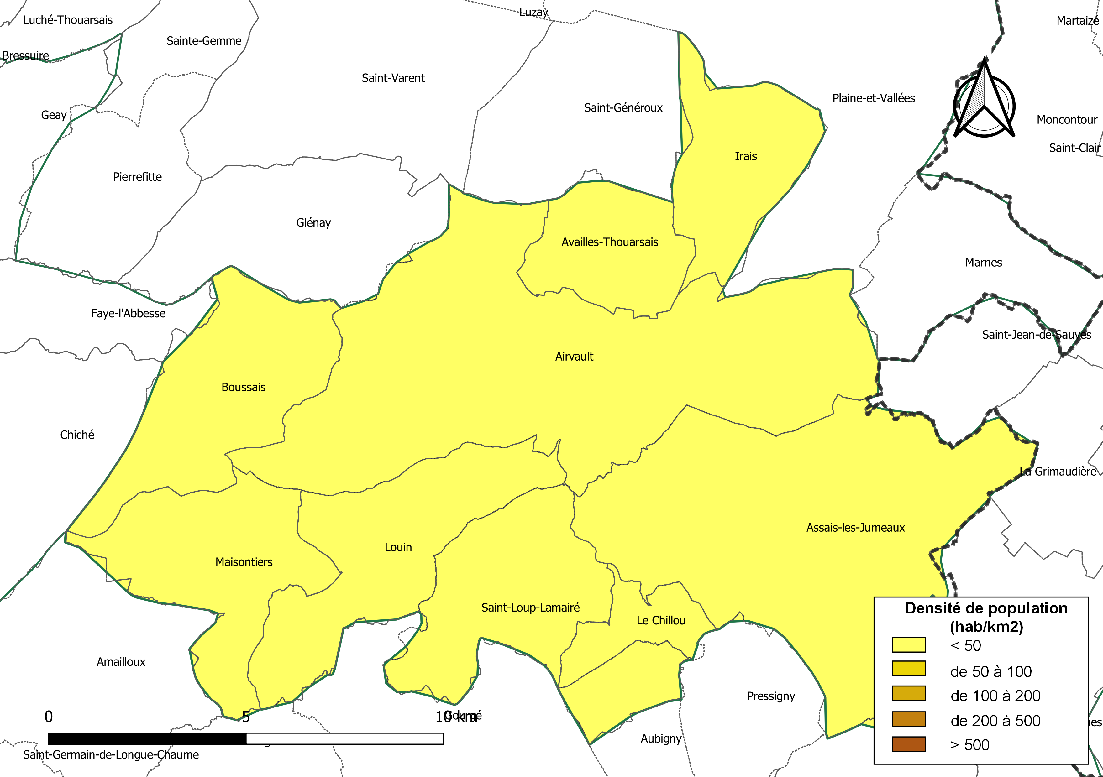 Carte des densités de population (millésimée 2016) des communes de la Communauté de communes Airvaudais-Val du Thouet, département des Deux-Sèvres, France. Composition au 1er janvier 2019.